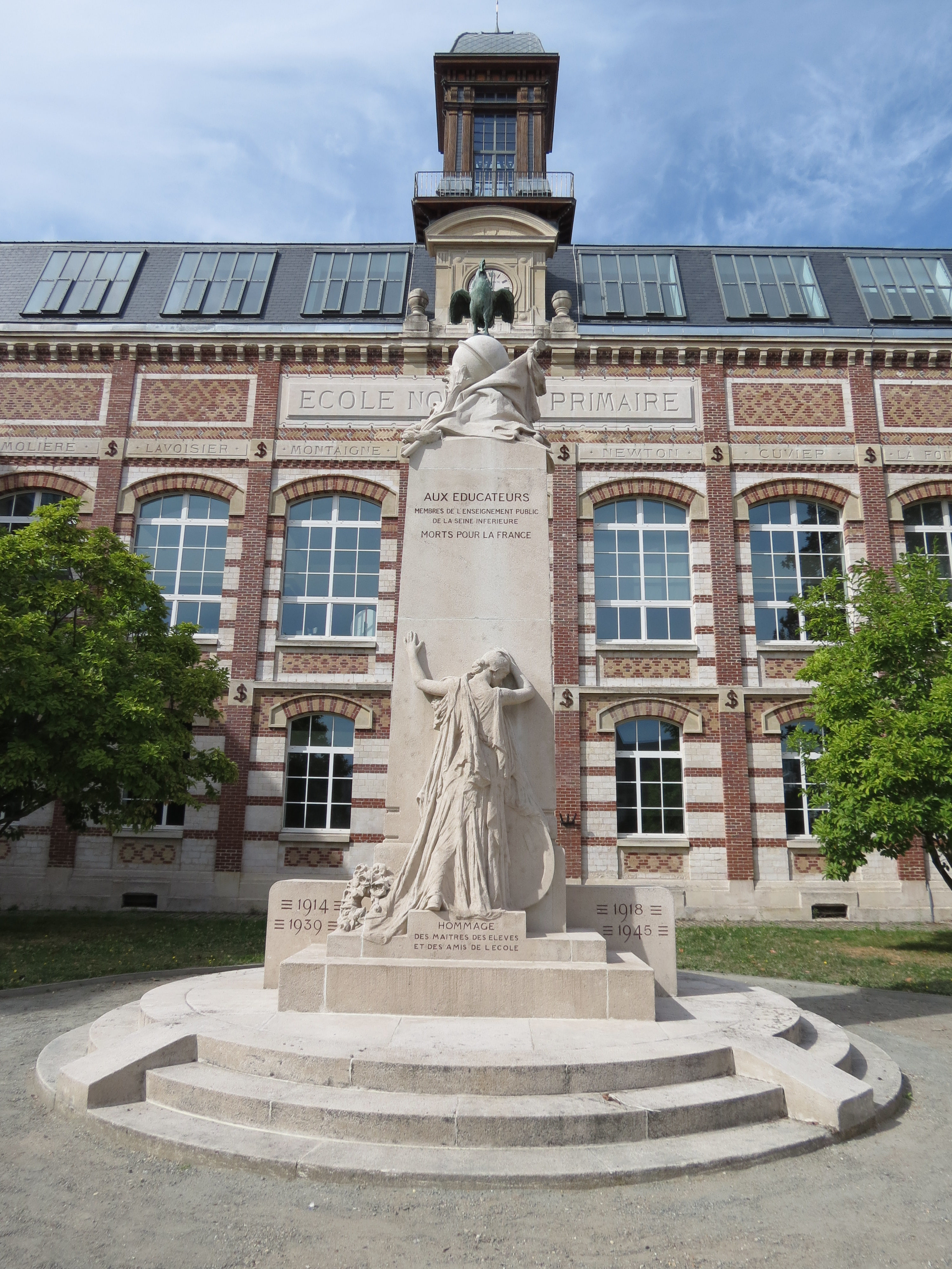 Pôle Régional des Savoirs.